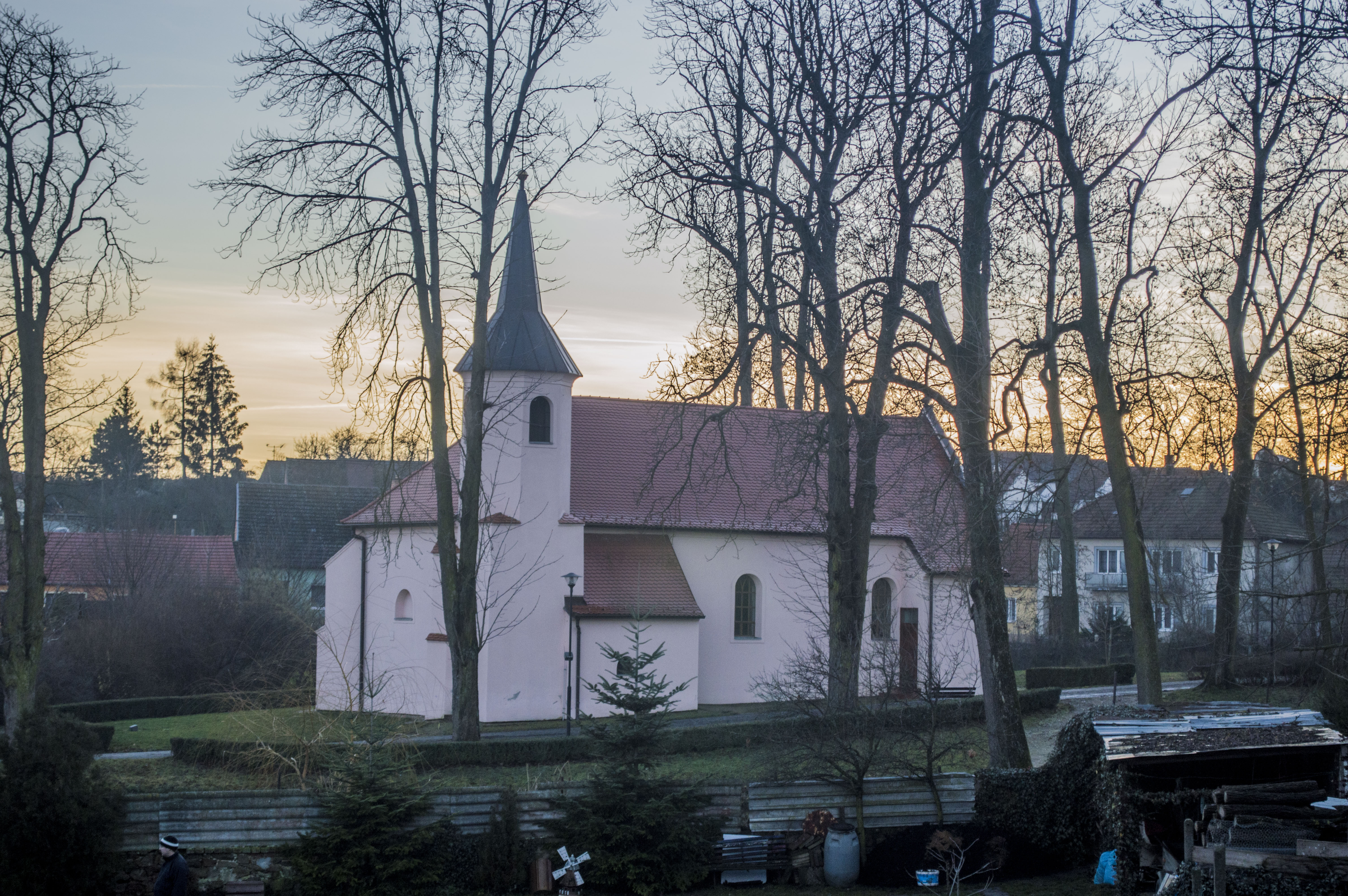 Kostel sv. Mikuláše v Miroslavských Knínicích - pohled od severu.